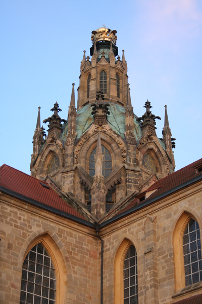 Kopule klášterního kostela Nanebevzetí Panny Marie v Kladrubech. Kostel byl postaven ve stylu tzv. barokní gotiky Janem Blažejem Santini-Aichlem.